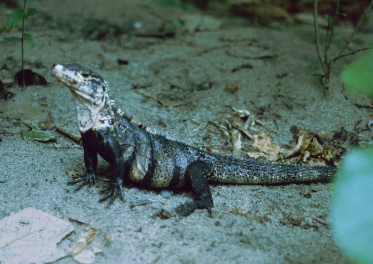 Schwarzer Leguan (Ctenosaura similis), Leguane (Iguanidae) - Costa Rica, Prov. Puntarenas, Parque Nacional Manuel Antonio